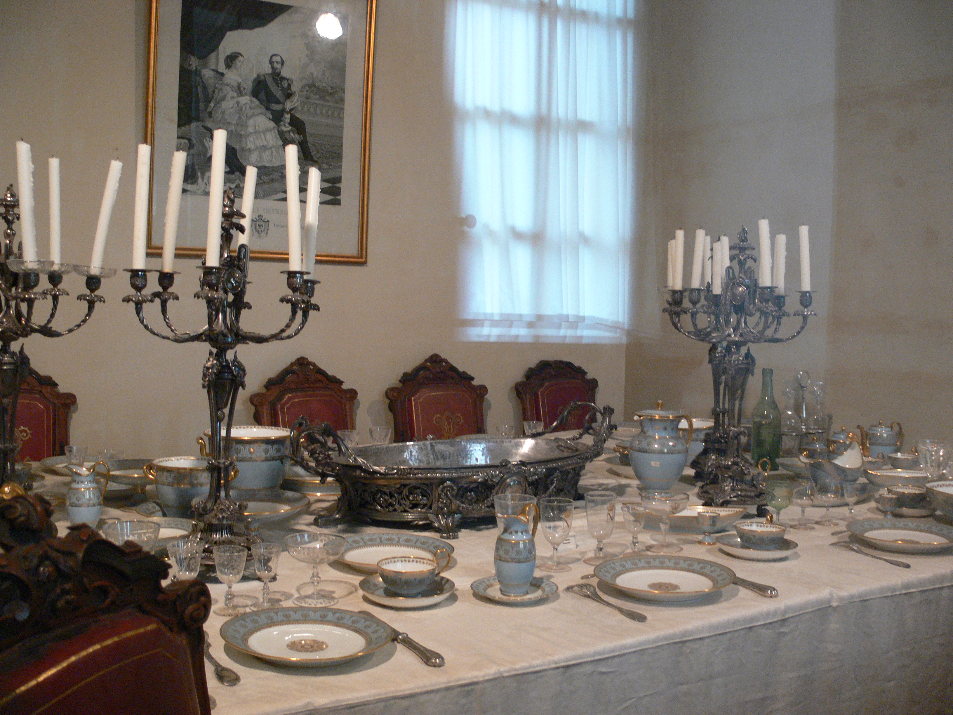 Table (Second Empire) Compiègne, France: Château de Compiègne; Musée du Second Empire